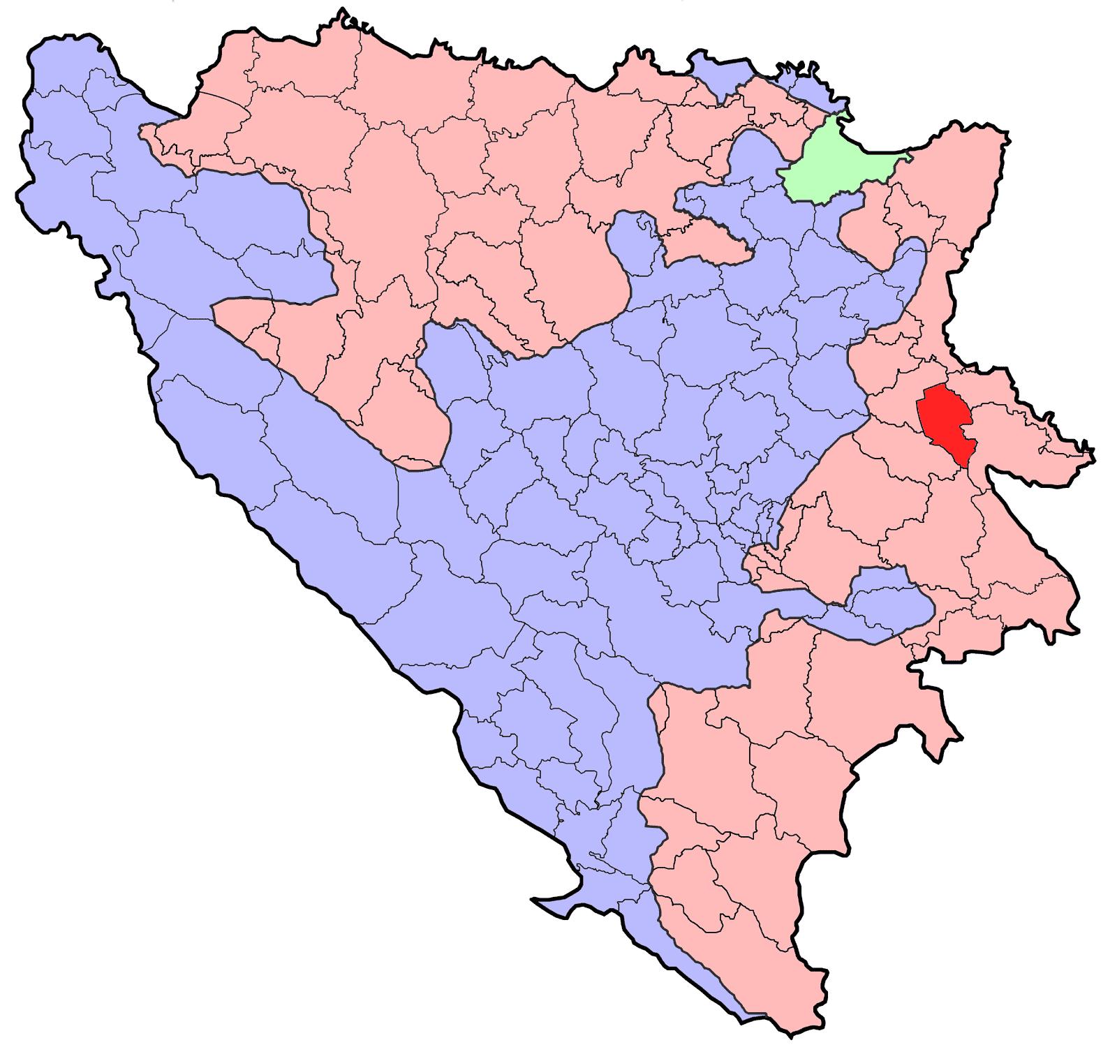 Republika Srpska (BiH) municipality